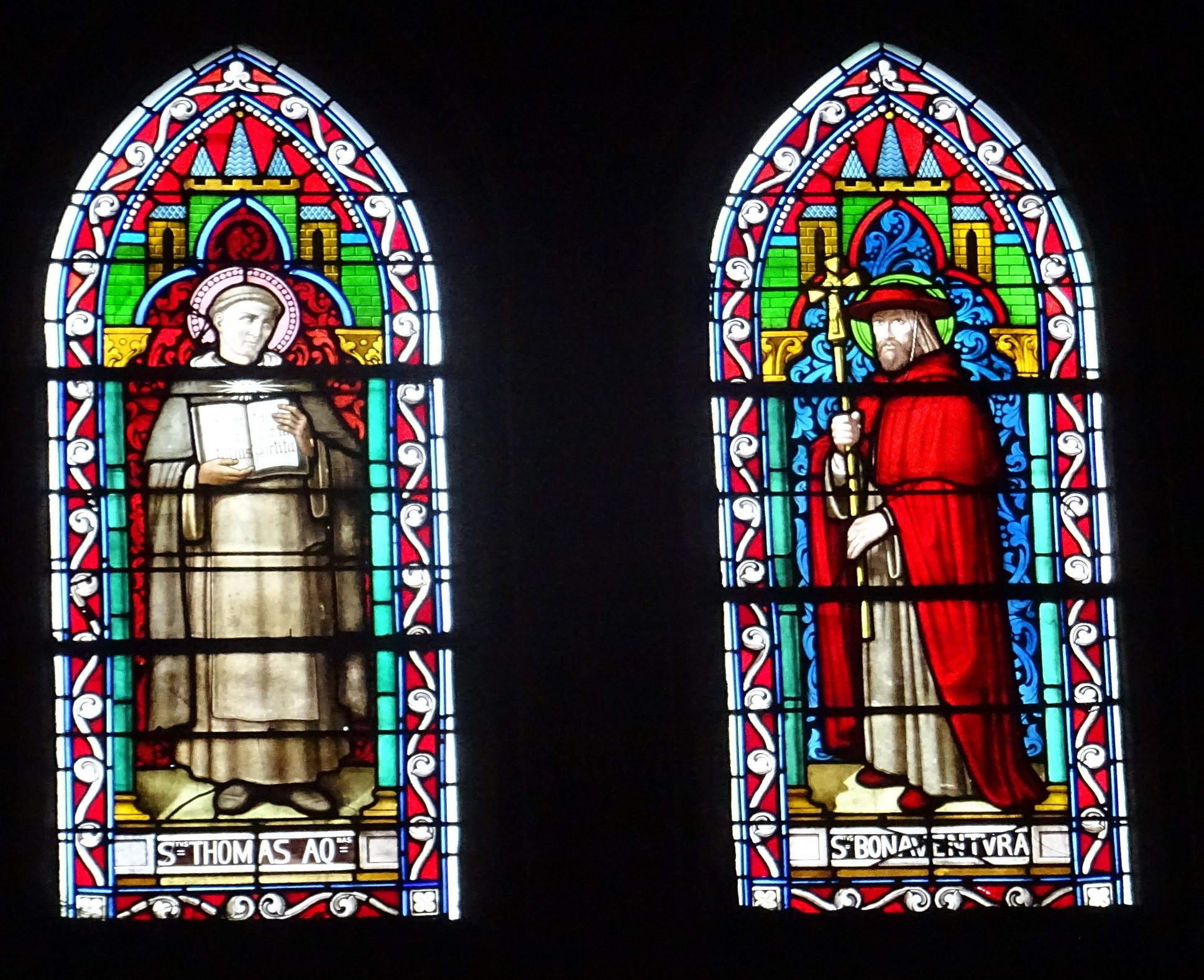 Eglise de Maromme (Seine-Maritime, France) : vitraux représentant les saints Thomas d'Aquin et Bonaventure